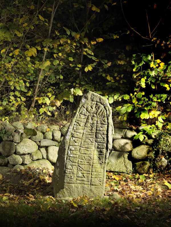 Foto: Nationalmuseet ved Roberto Fortuna